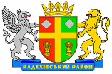 Герб Радехівського району